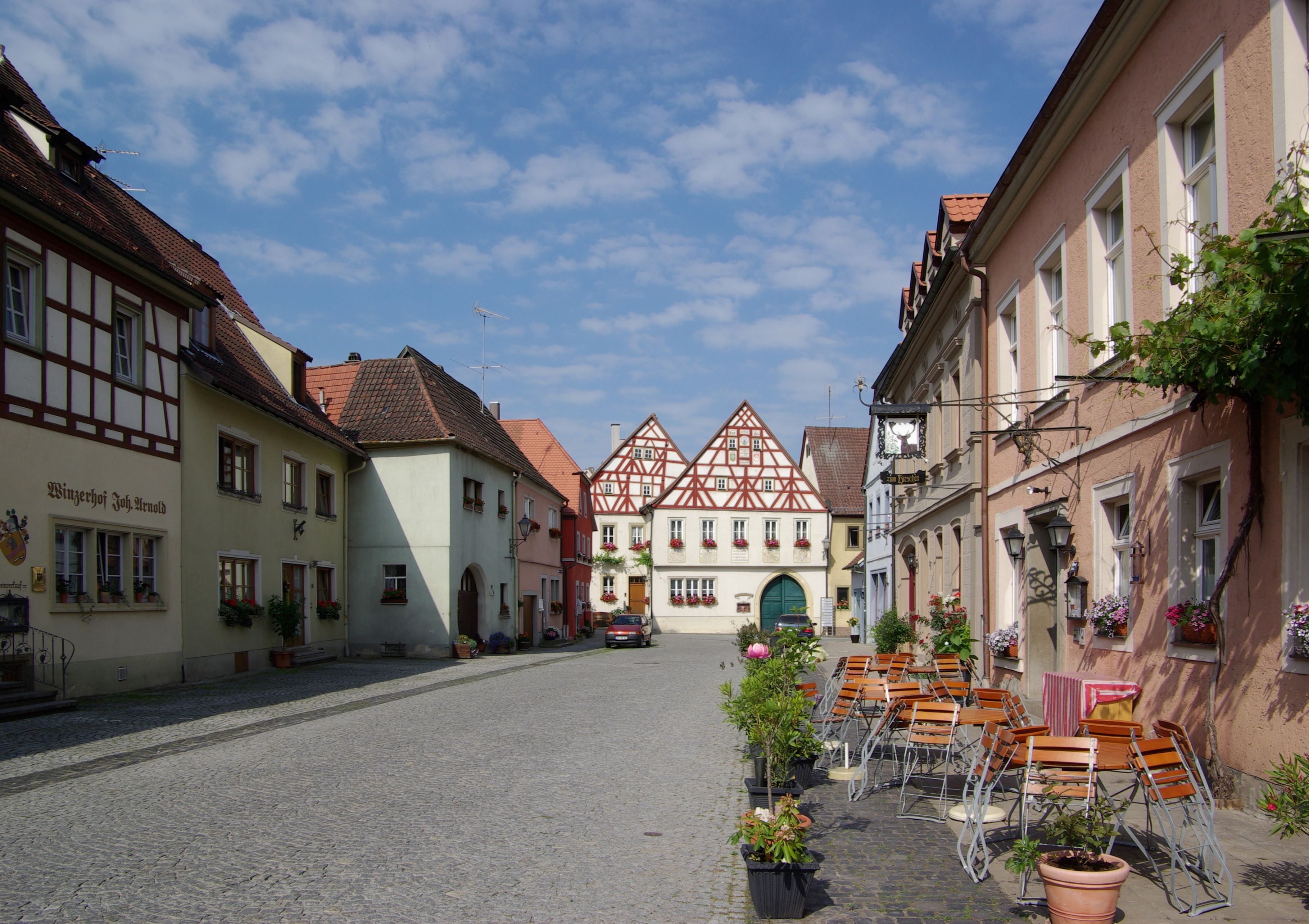 Iphofen, Lange Gasse, Blickrichtung Westen